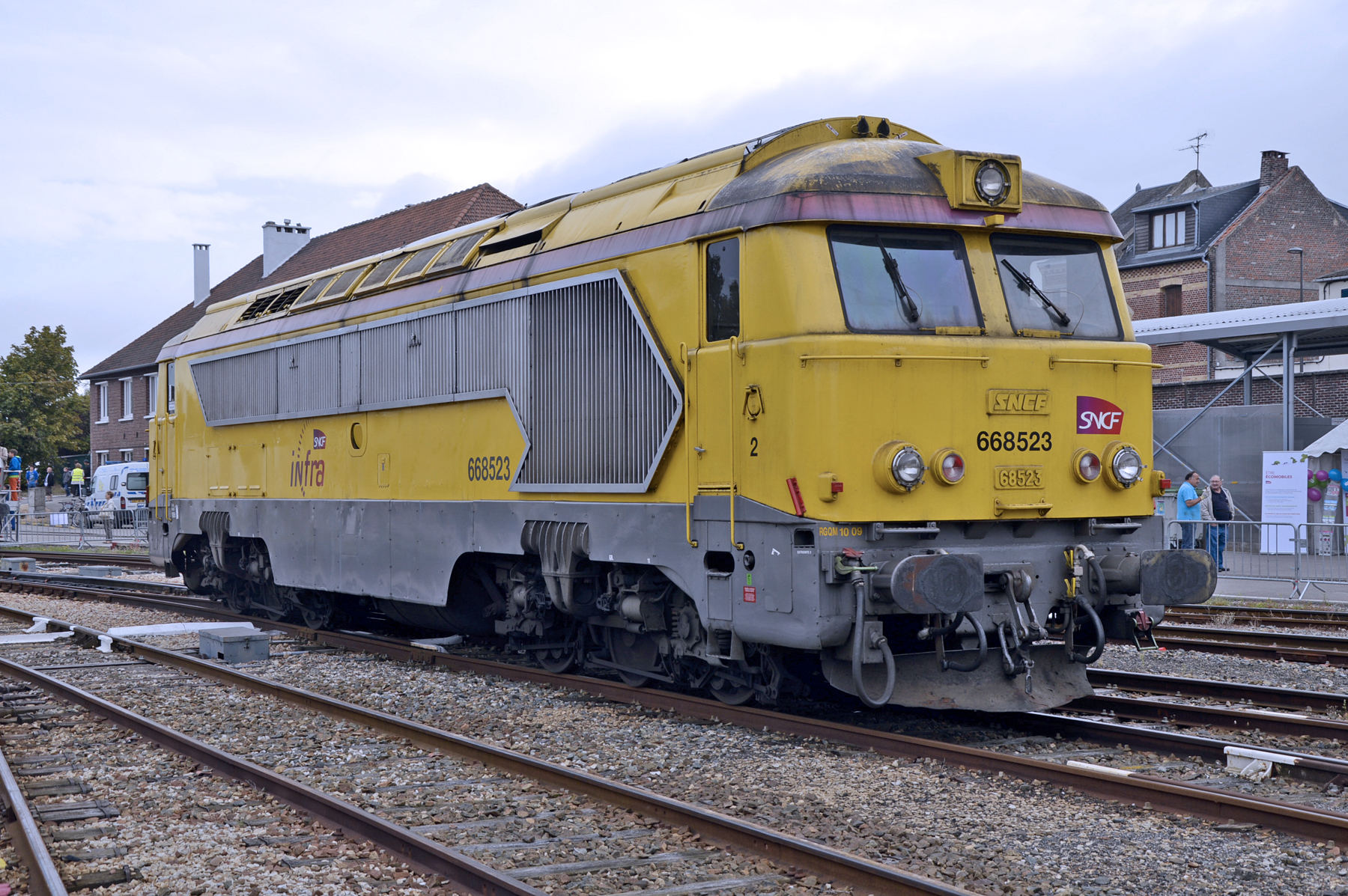 A1AA1A 68523 de la Cité du Train lors de la fête du rail à Longueau en octobre 2013